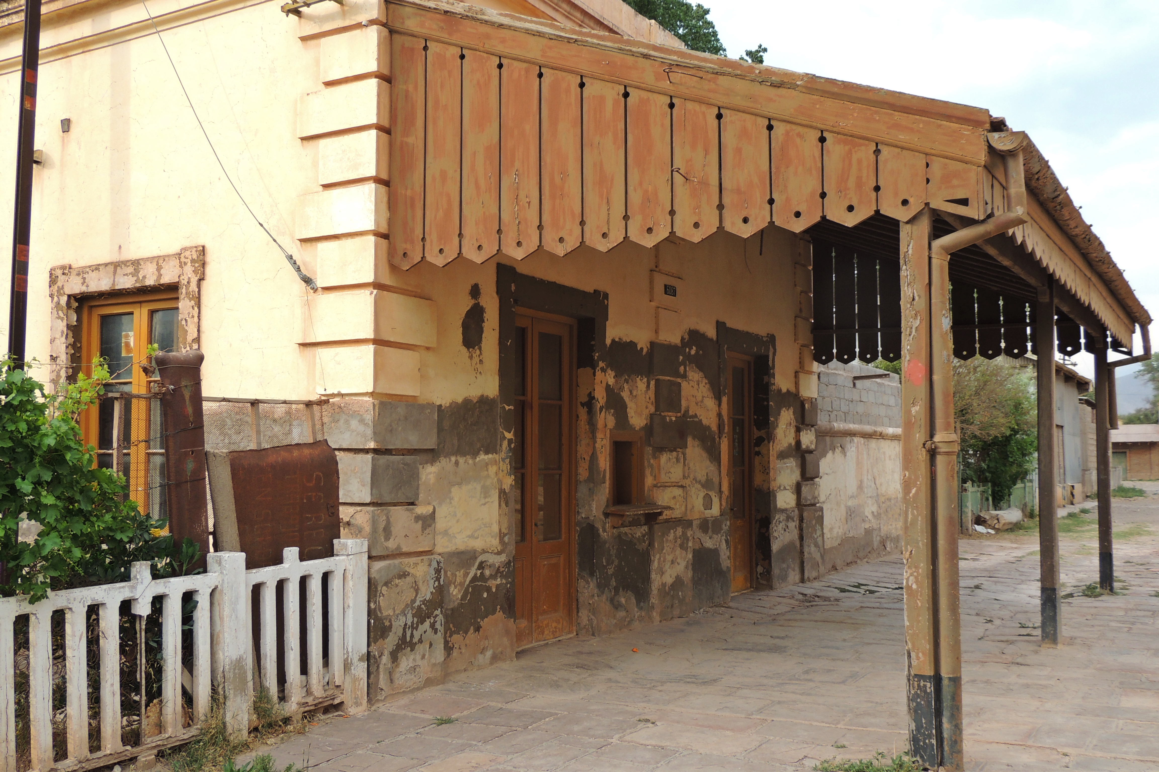 Maimará-Jujuy-Argentina